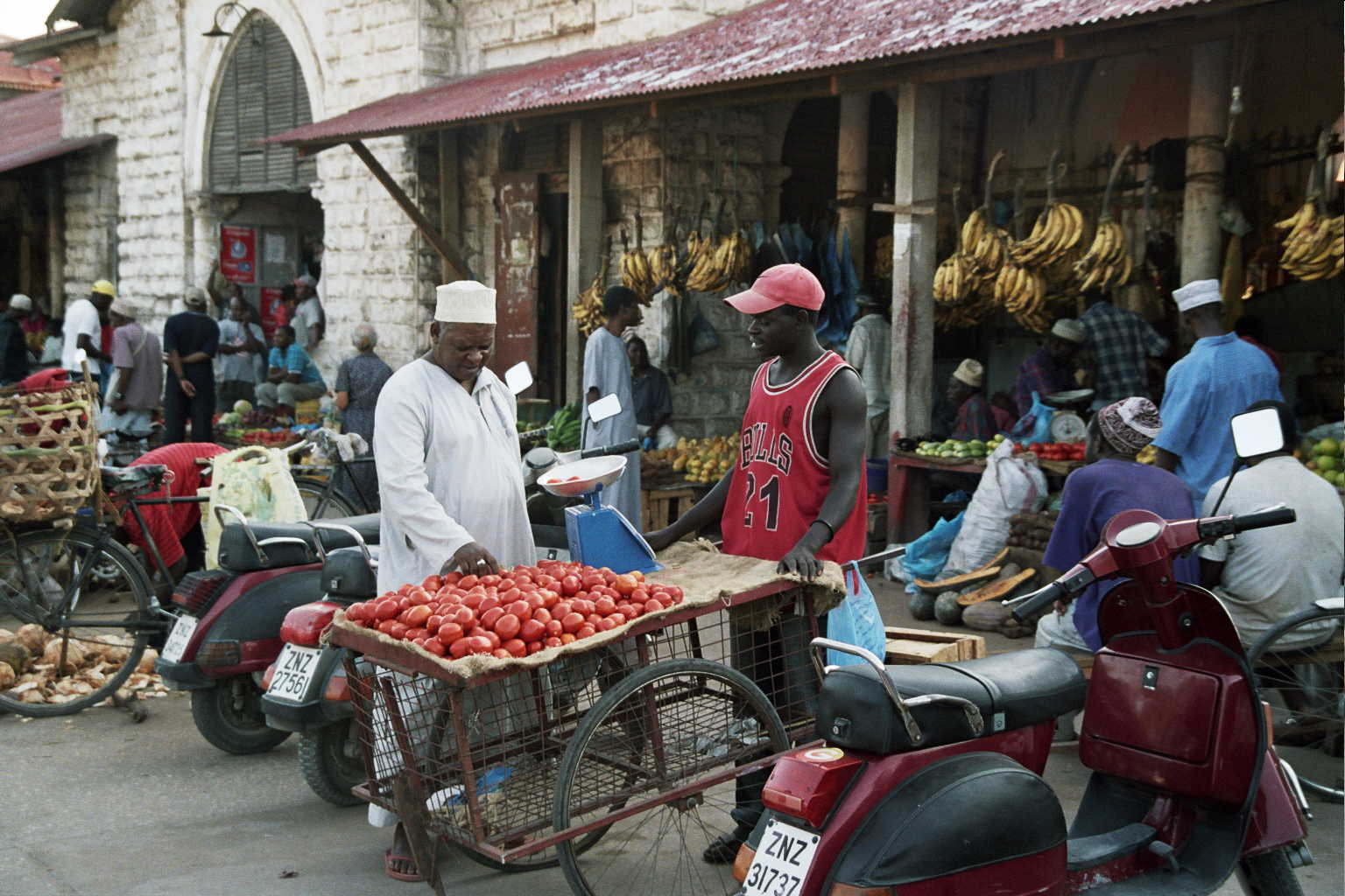 Darajani Market, Stone Town, Zanzibar